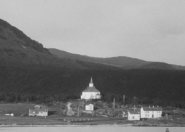 Sørreisa gamle kirke, som brant i 1987. Foto: Anders Beer Wilse (1. juli 1928). Fra Nasjonalbibliotekets samling.